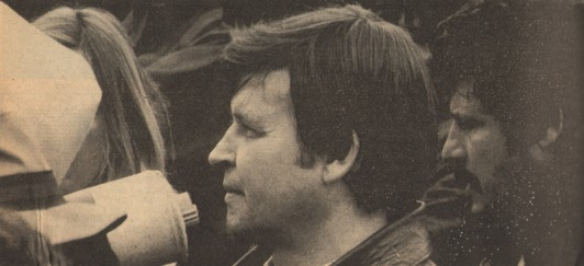 Pier Giuseppe Murgia durante le riprese de "La festa perduta"